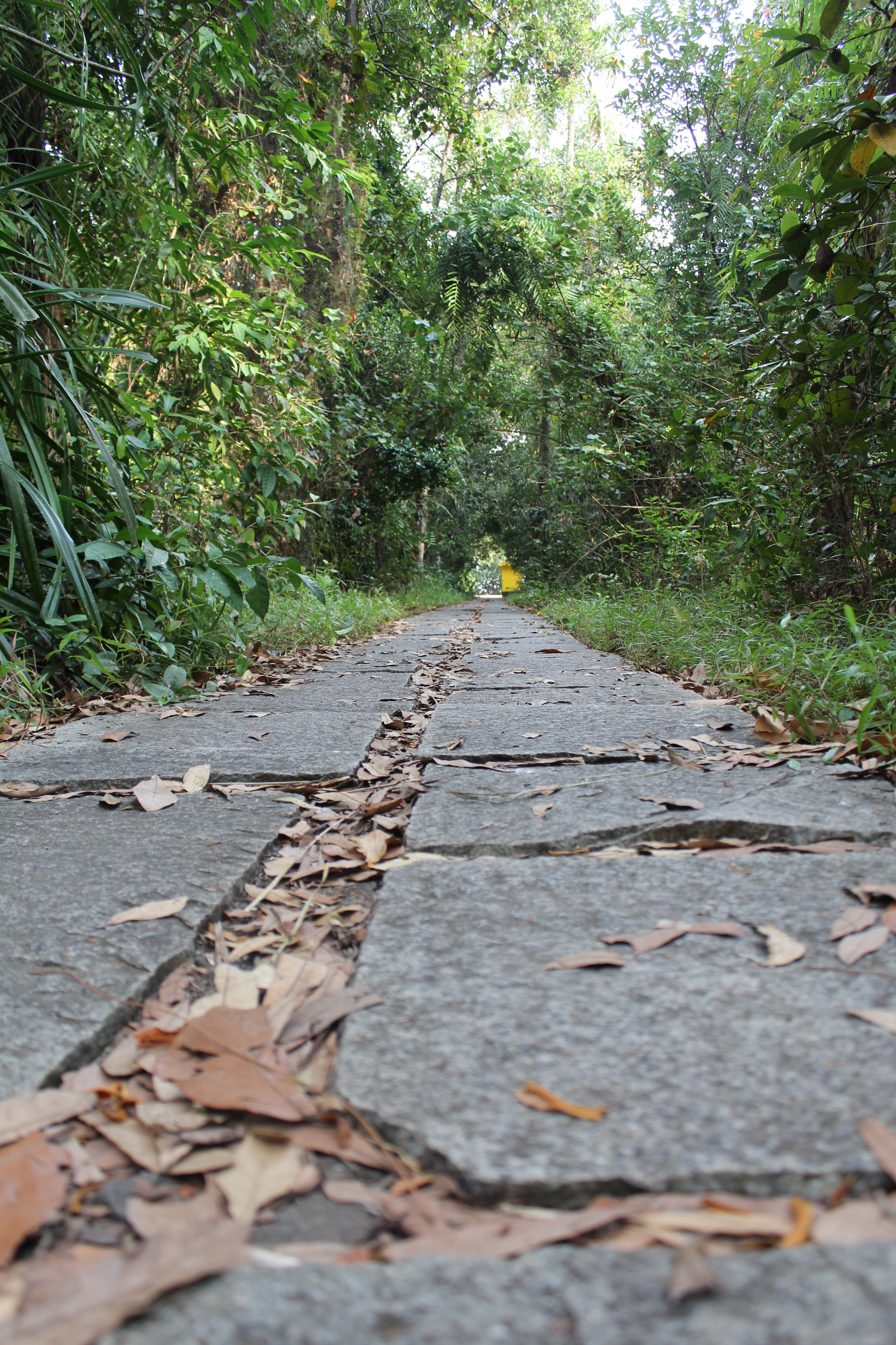 വേമ്പനാട്ടുകായലില്‍ പാതിരാമണല്‍ ദ്വീപിലെ നടപ്പാത